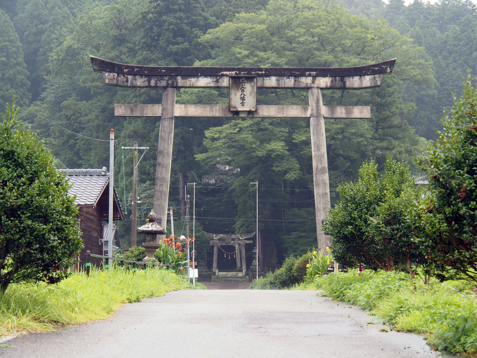 緒方三社二の宮鳥居（大分県豊後大野市）